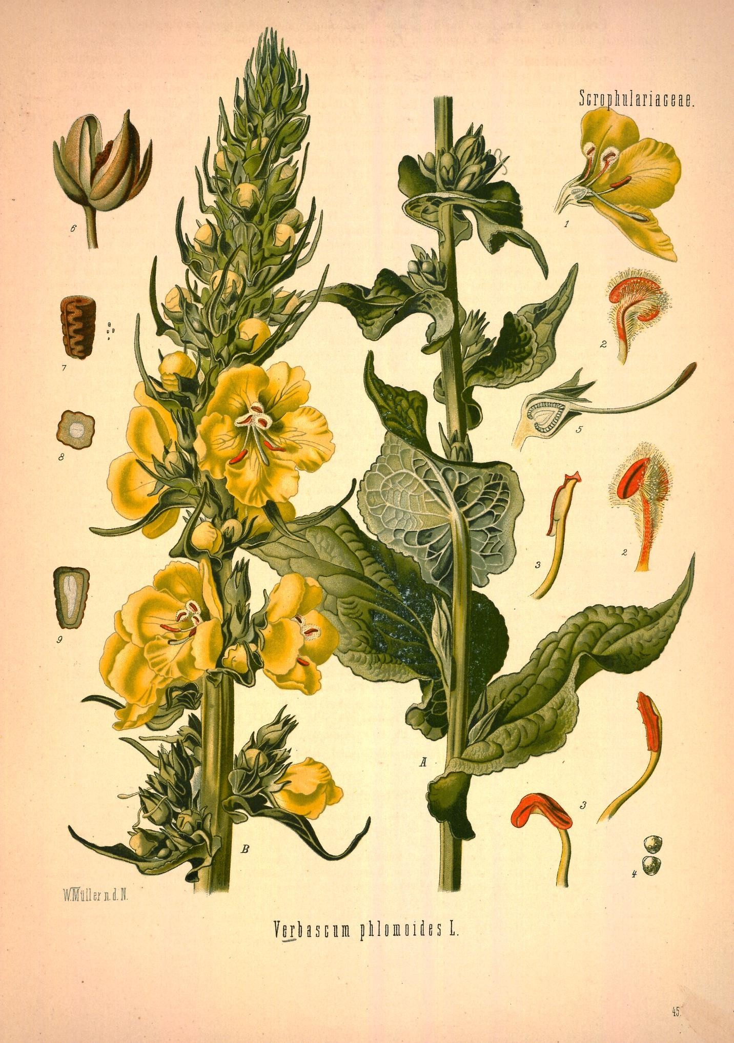 ScriphhriaGBae - ill em IN. ■ Tirkissim jlloioiilu 1 «.